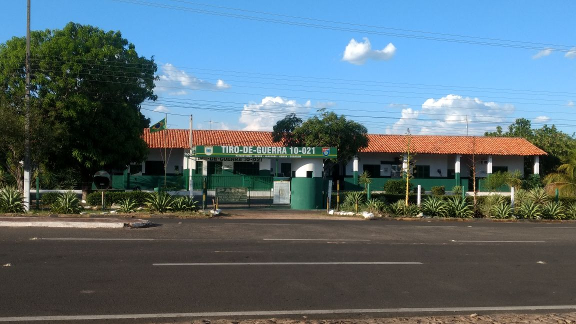 Imagem do Tiro de Guerra de Piripiri, no Piauí, instituição do Exército do Brasil.